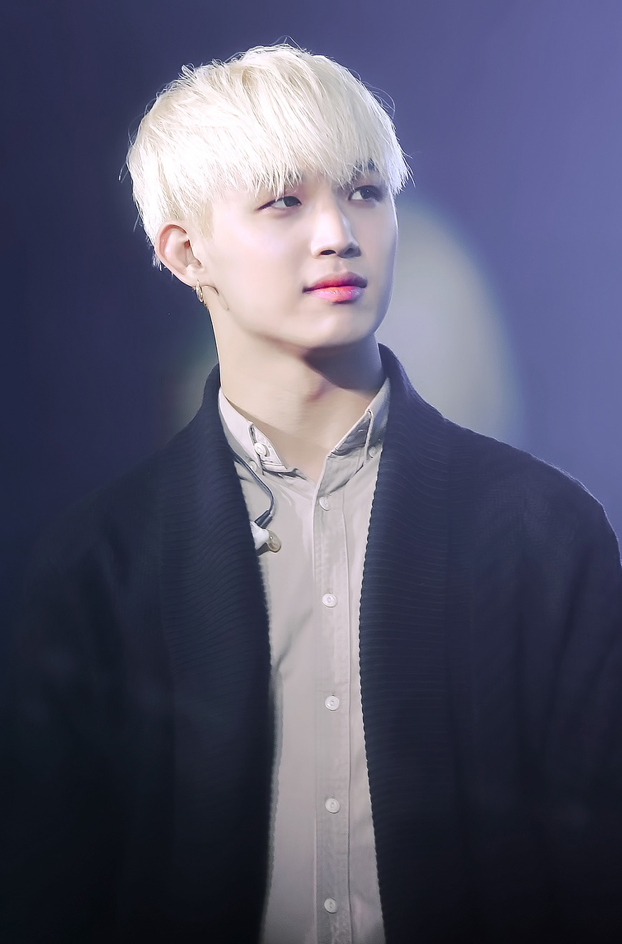 170121-22 비티비티 현식